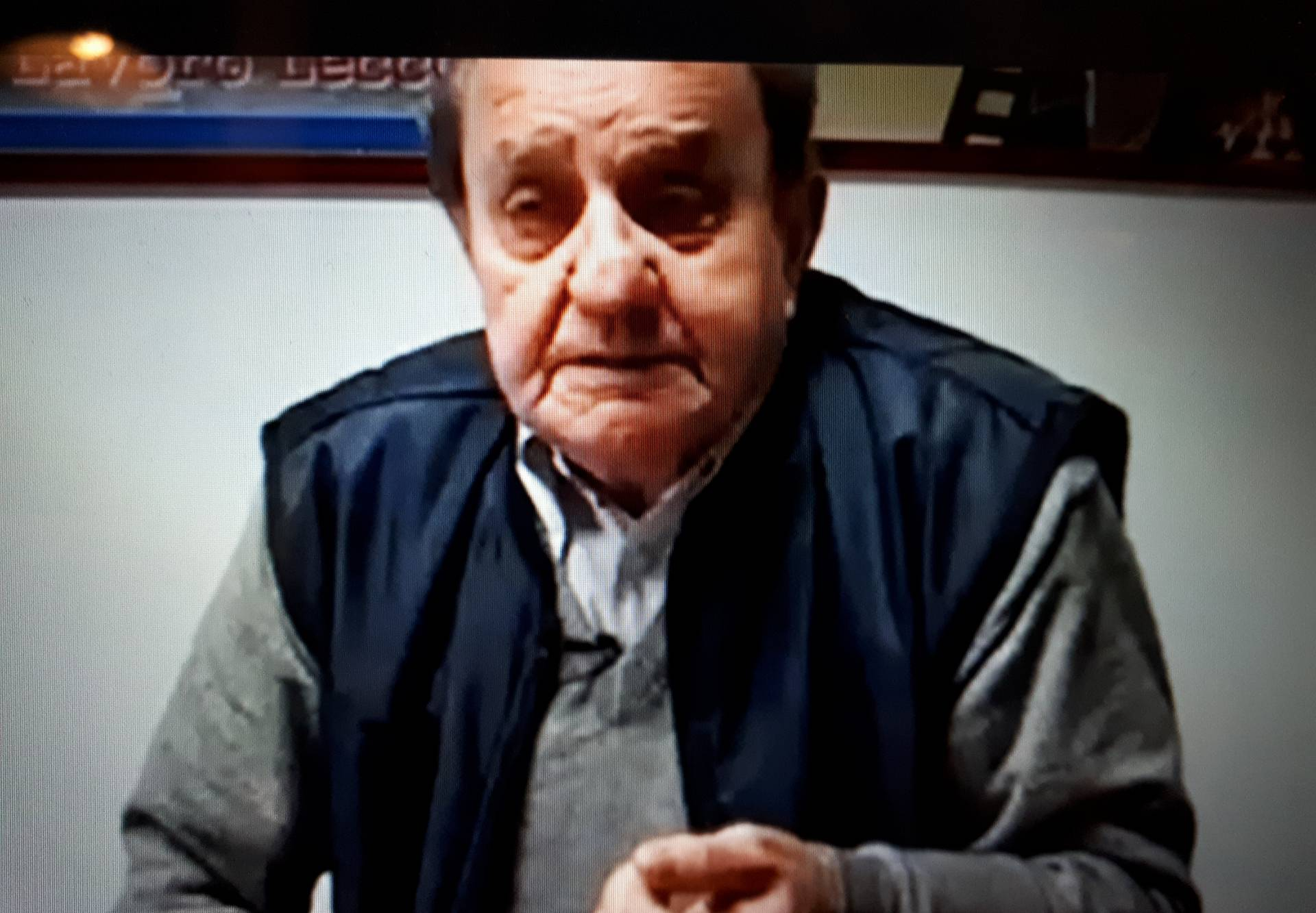 Pino Galbani durante l'intervista del maggio 2006